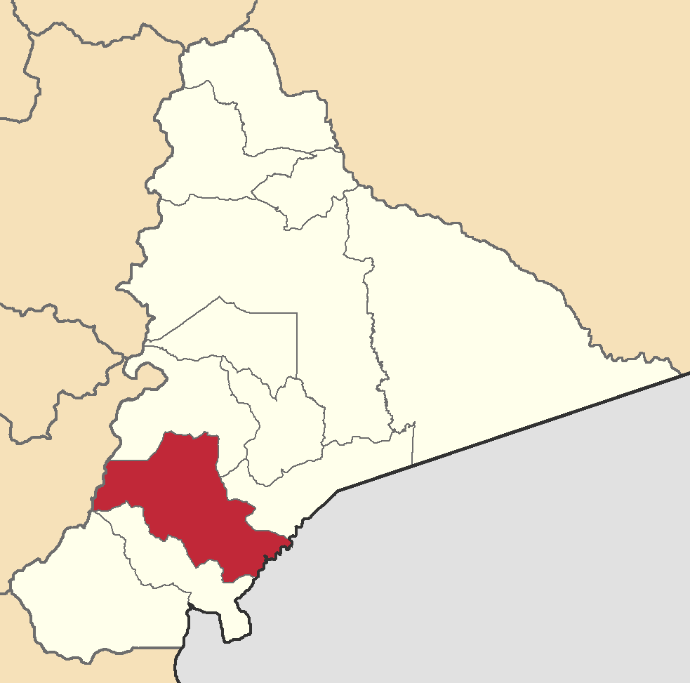 Mapa localizador del cantón en Morona-Santiago, Ecuador